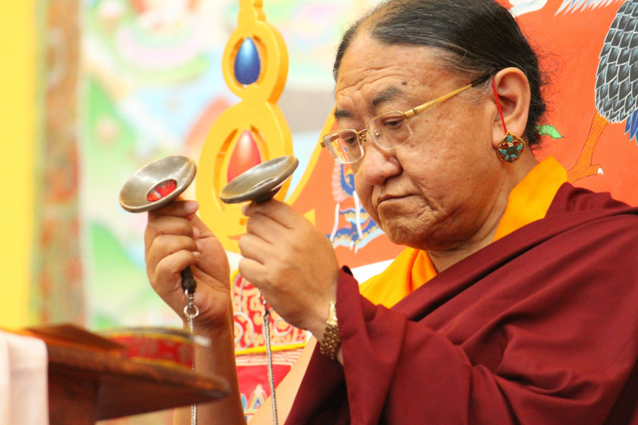 Su Santidad el 41º Sakya Trizin, Ngawang Kunga